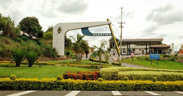 Puerta de entrada